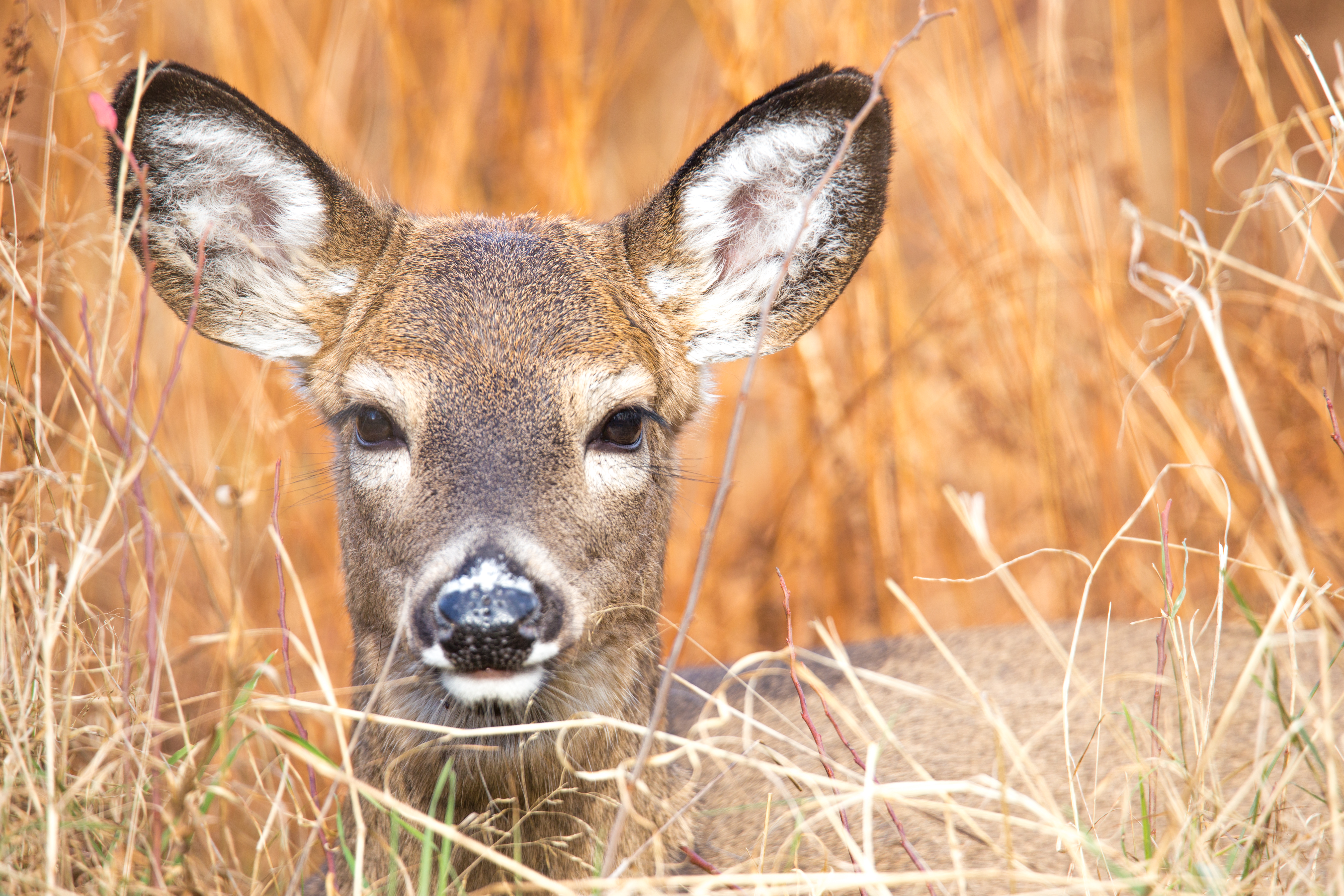 NPS | Katy Cain